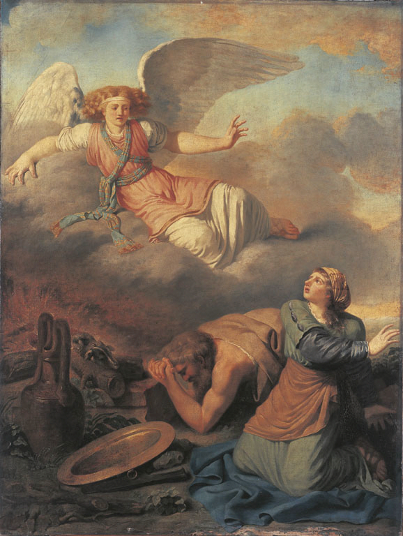 Joseph Melling, Laban donne sa fille à Jacob, 1750, Paris, Ecole Nationale Supérieure des Beaux-Arts